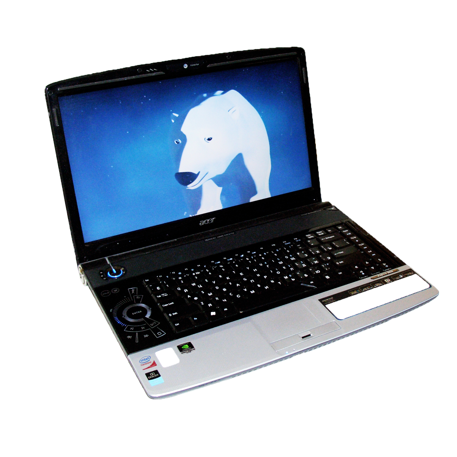 Acer Aspire 6920